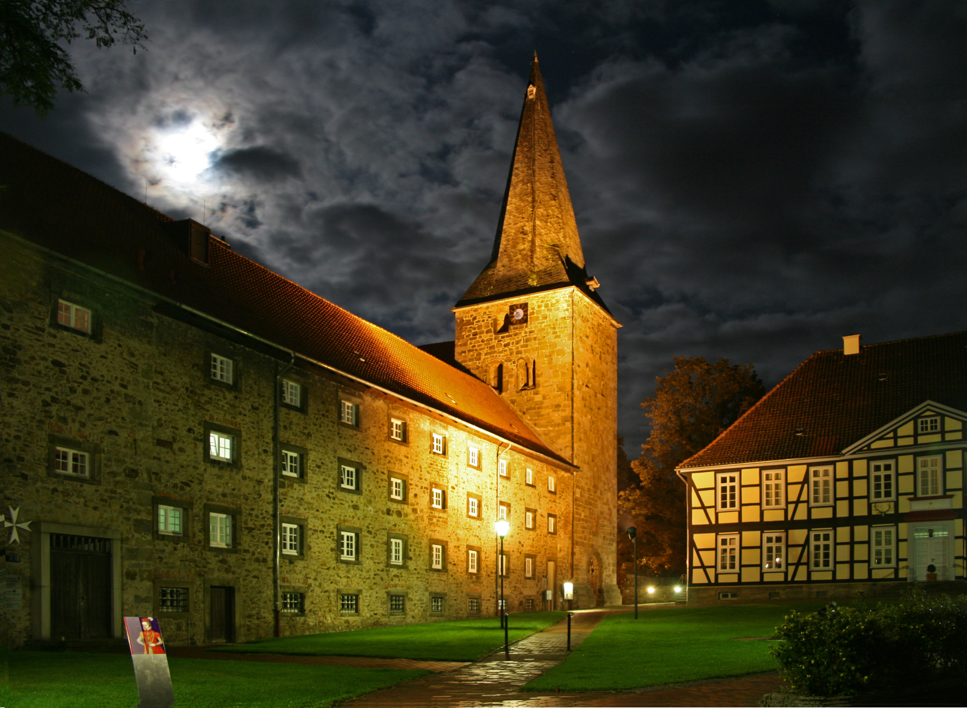 Kloster Wennigsen bei Nacht, Sommer 2009.